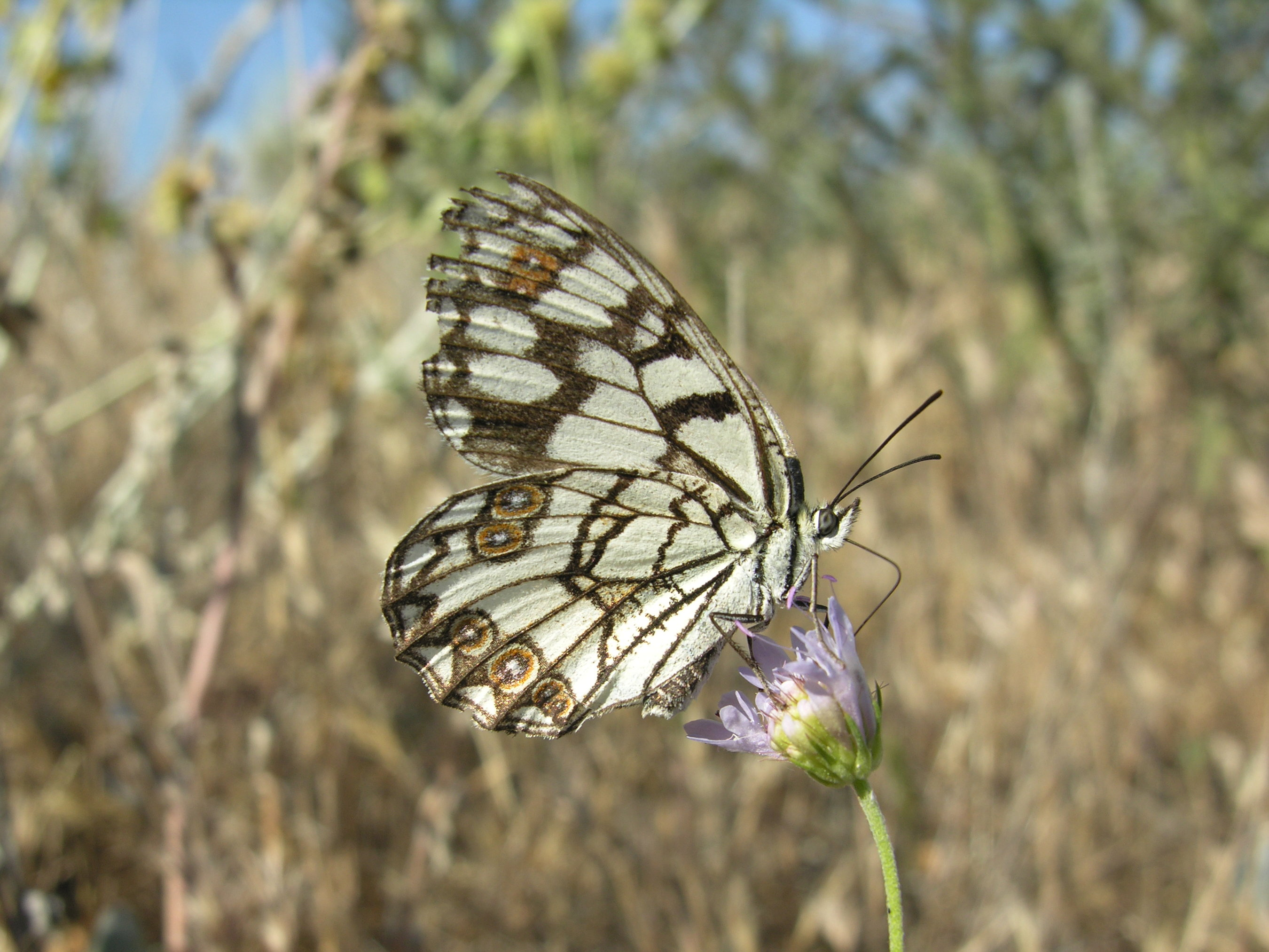 Melanargia ines (Nymphalidae, Satyrinae). Rivas Vaciamadrid, Madrid, España.